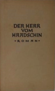 Franz Spunda. Der Herr vom Hradschin. Wien 1942, vordere Einbandseite.